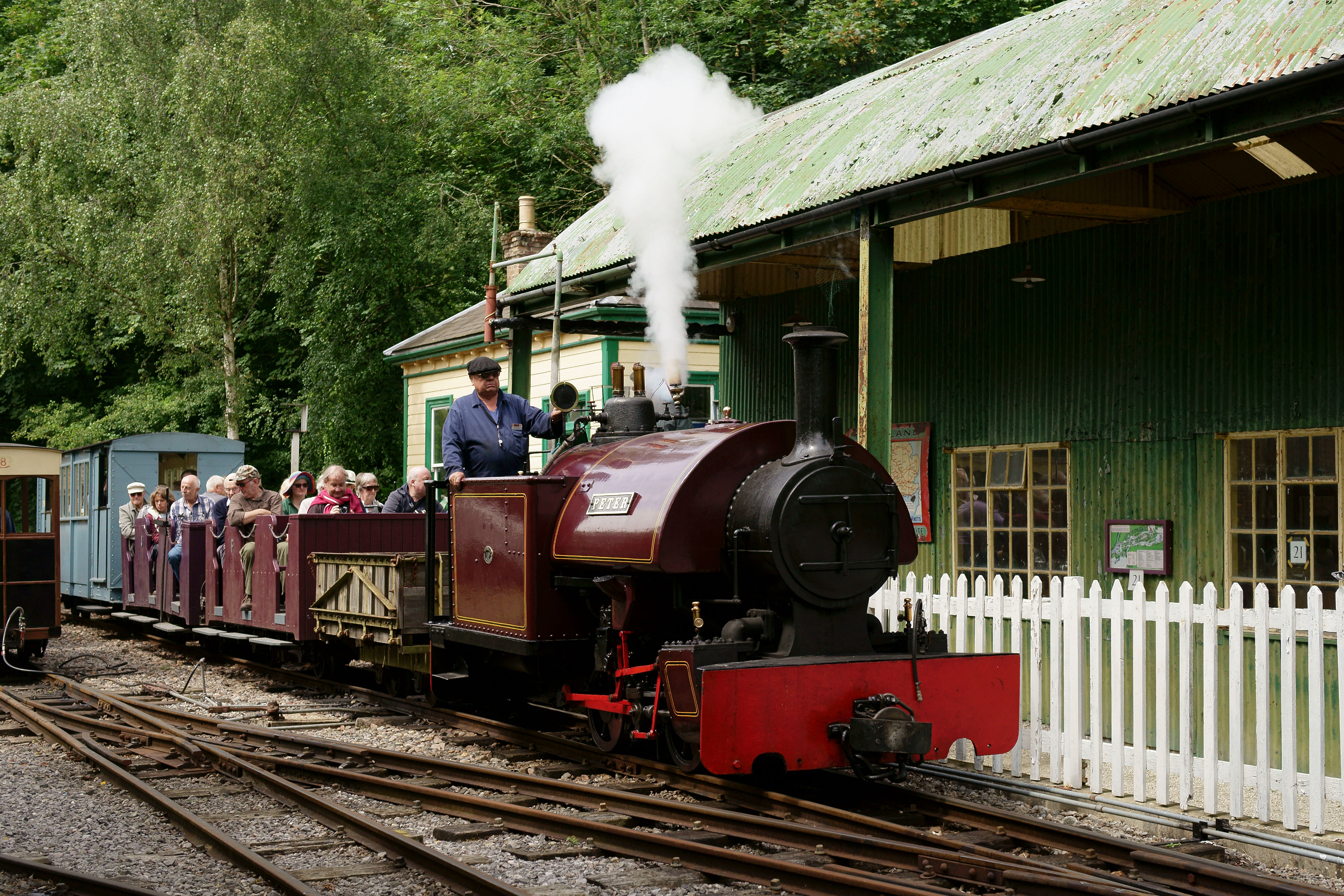 Railway Gala Weekend.